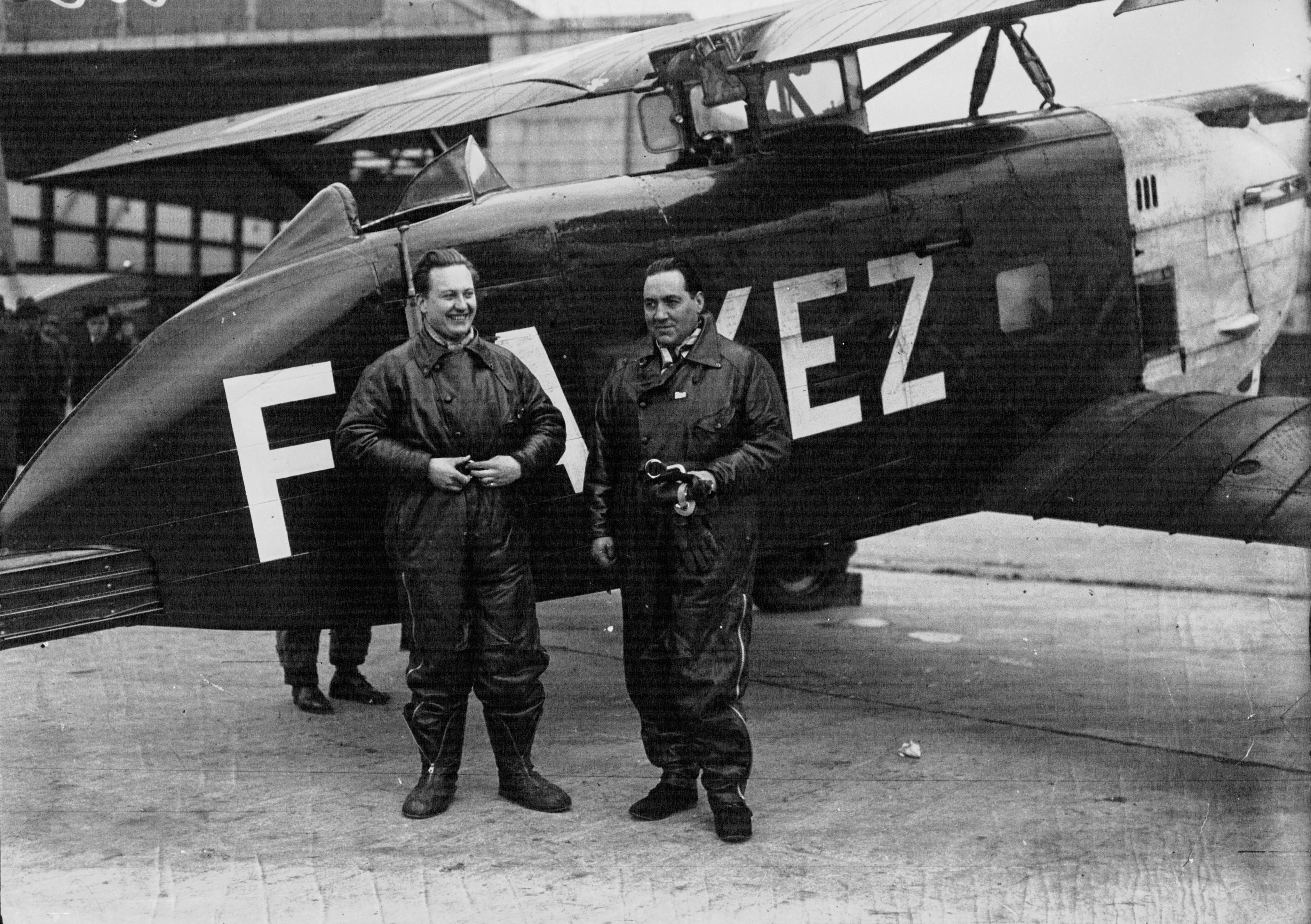 Robida et Codos, aviateurs.